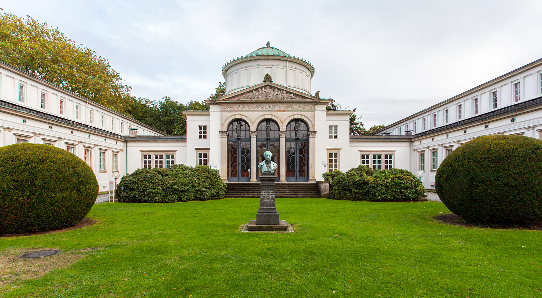 Badehaus I in Bad Oeynhausen This is a photograph of an architectural monument.